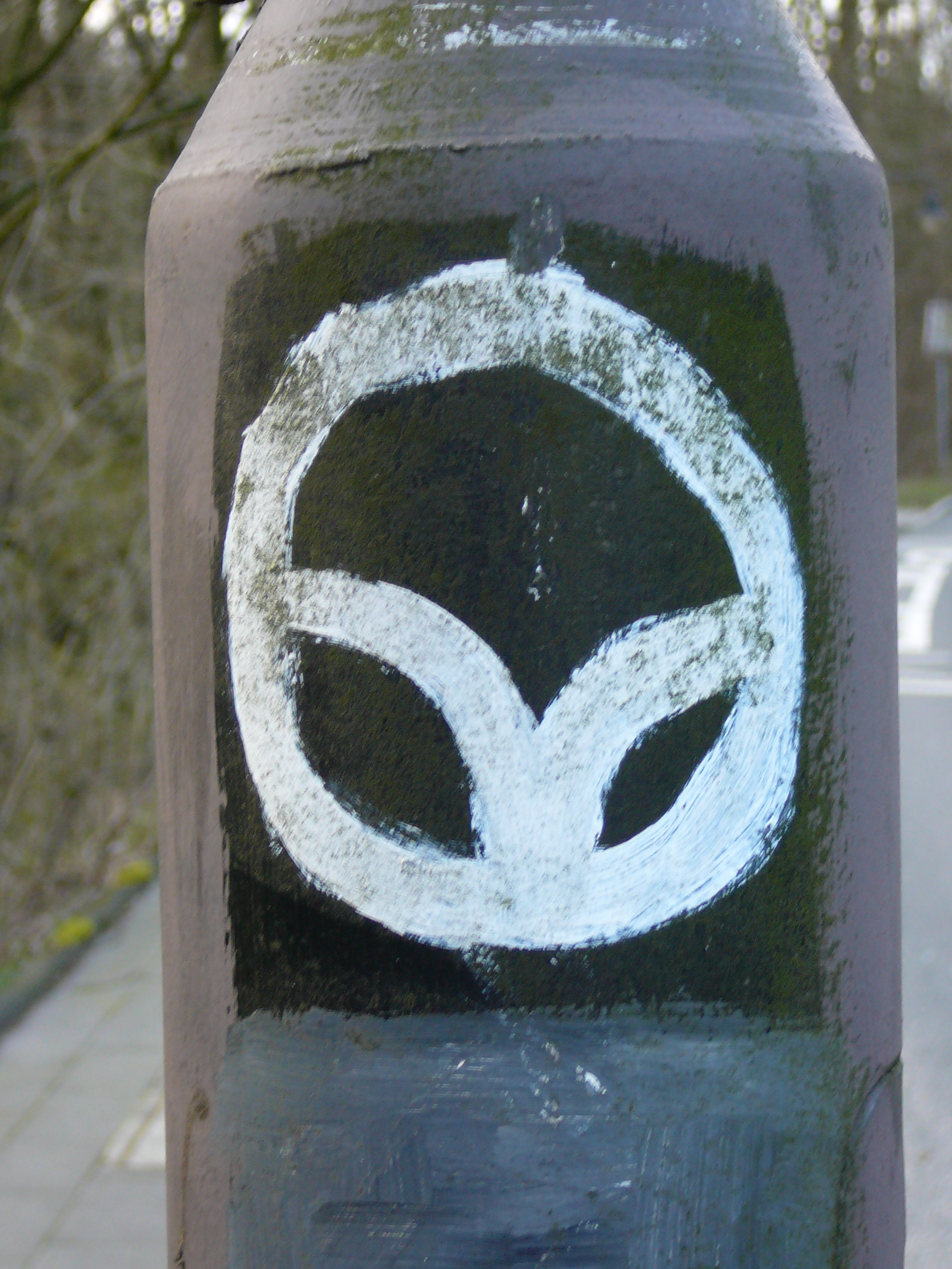 In der Beek, Wuppertal/Katernberg-Uellendahl